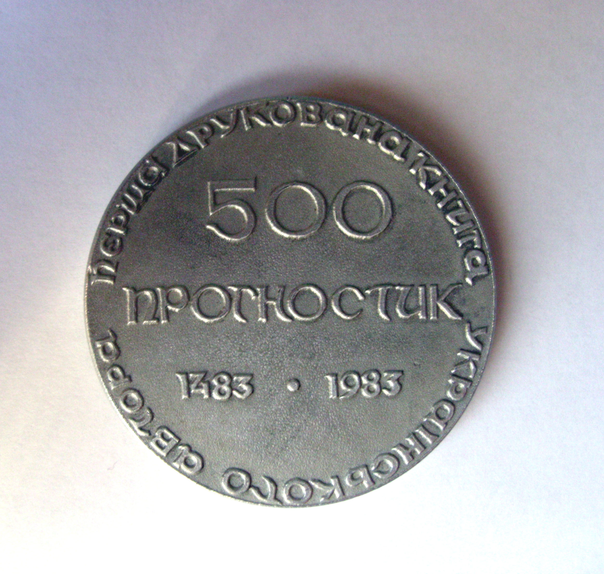 памятна медаль Ю.Дрогобича